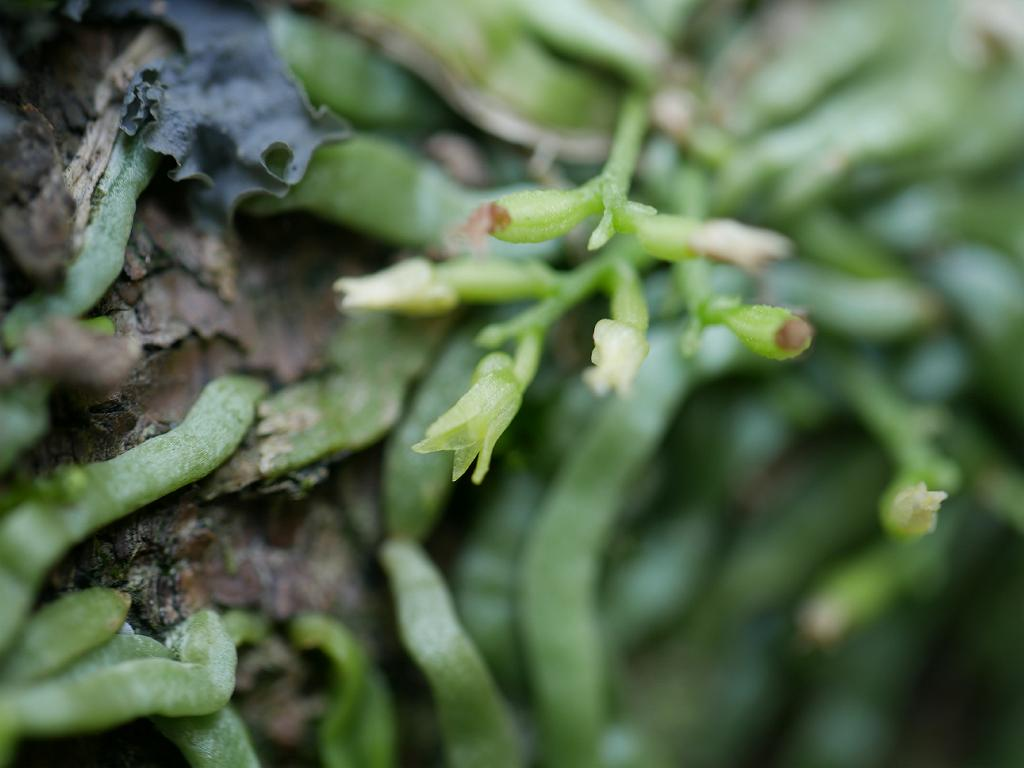 Taeniophyllum glandulosum：クモラン 2018/07/19 和歌山県田辺市：Tanabe City. Wakayama Pref. Japan